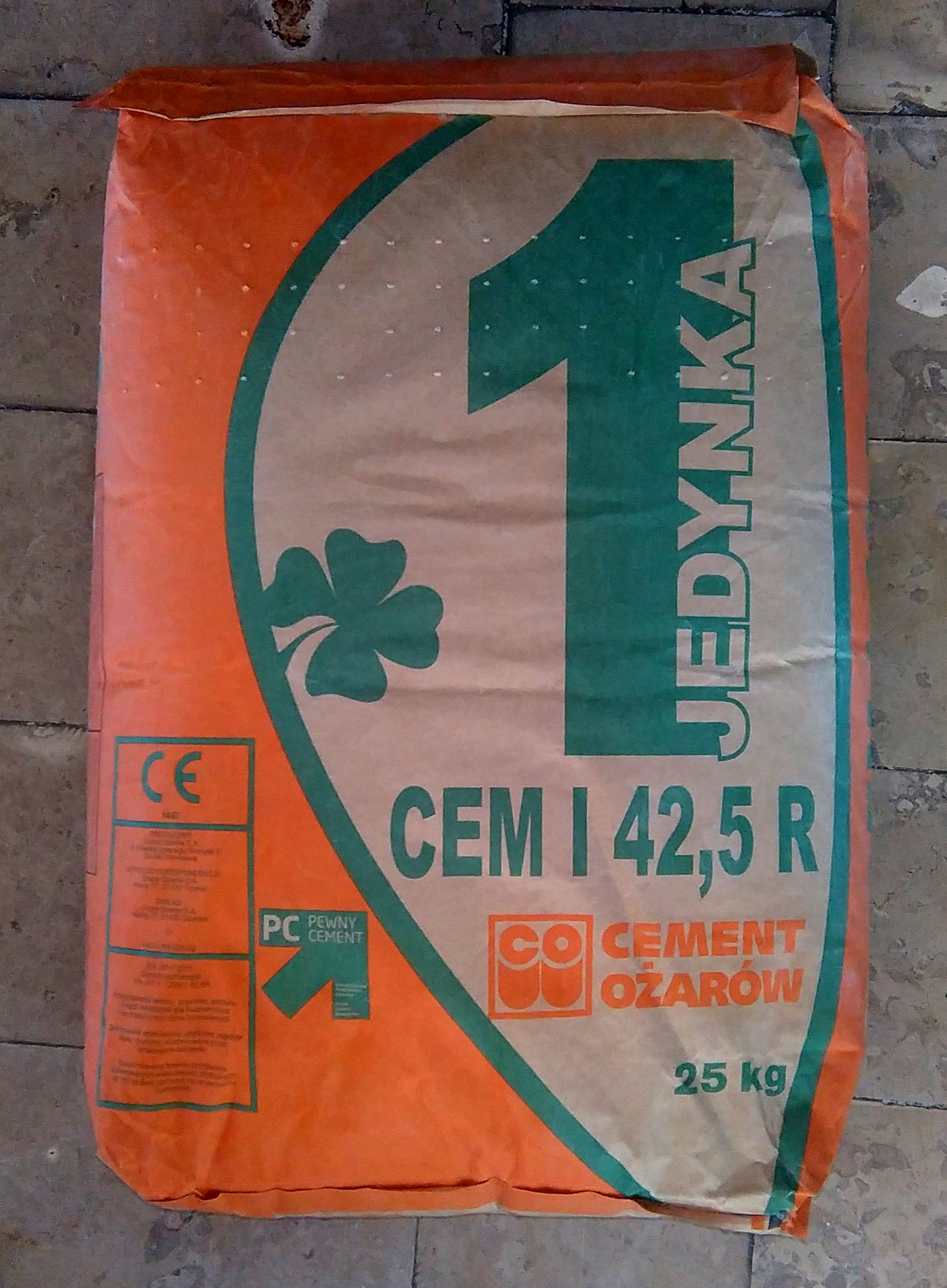 Portland cement CEM I 42,5 R in bag produced by Grupa Ozarow SA, Poland Worek cementu CEM I 42,5 R producent Grupa Ożarów SA